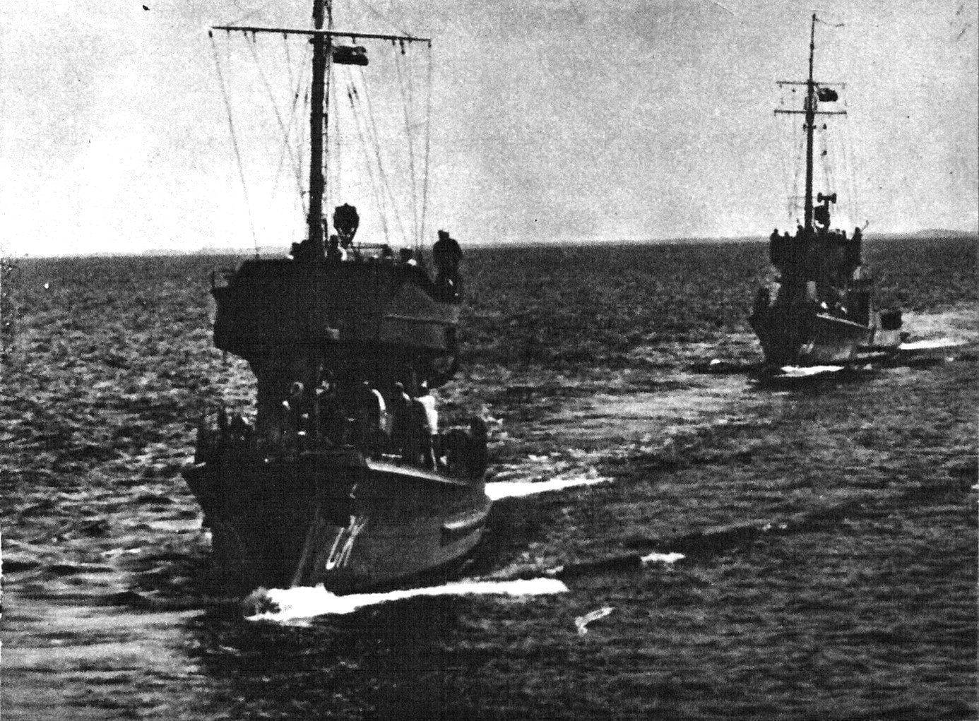 Trałowce typu Jaskółka - ORP "Czajka" i ORP "Mewa" w służbie powojennej